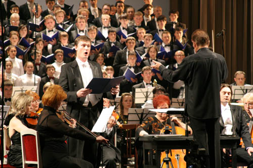 Саратовский академический театр оперы и балета. Исполнение симфонического Евангелия Алемдара Караманова «Совершишася»